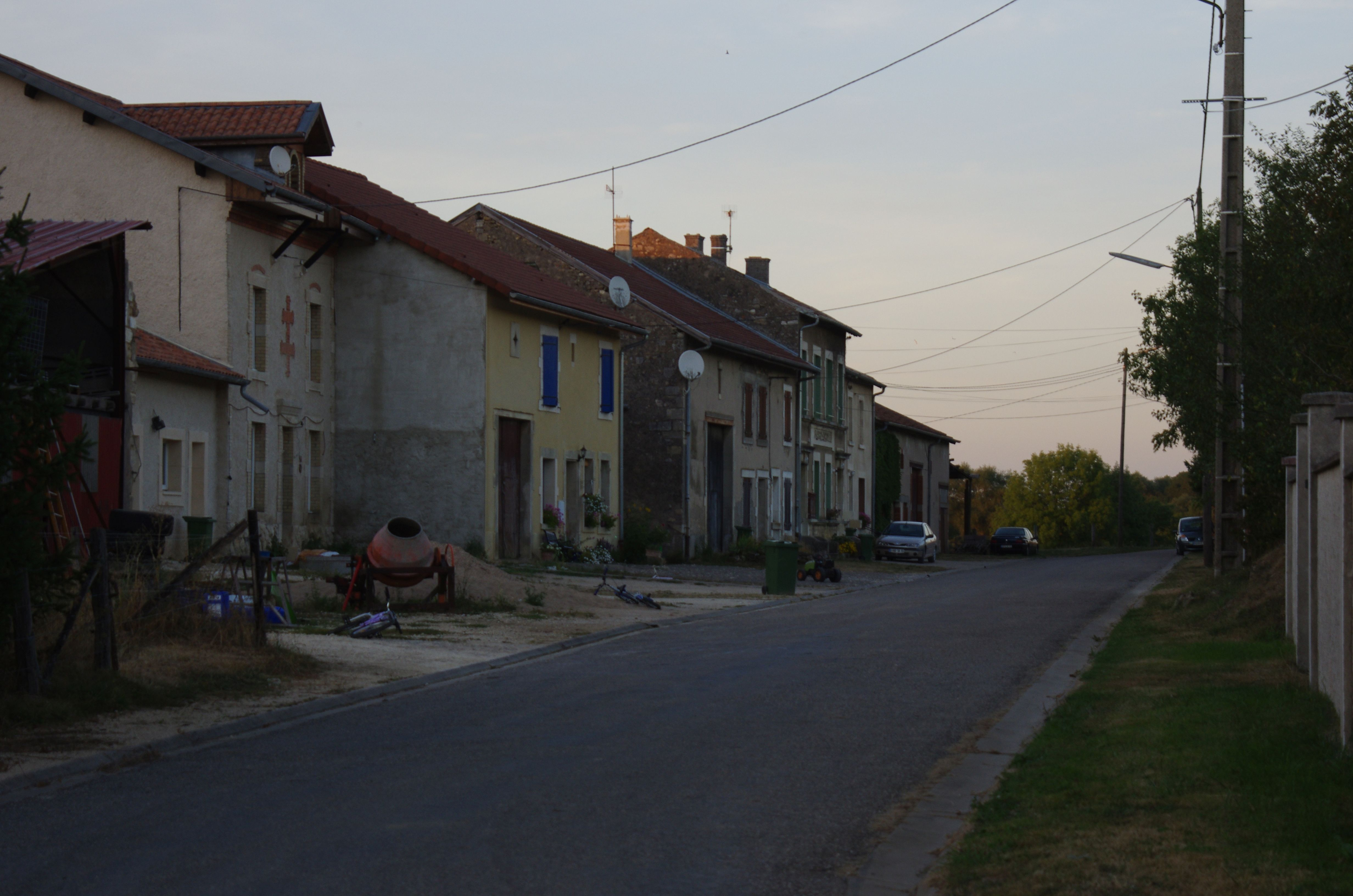 Lahayville im Department Meuse in Lothringen. Eine Straße im Ort.